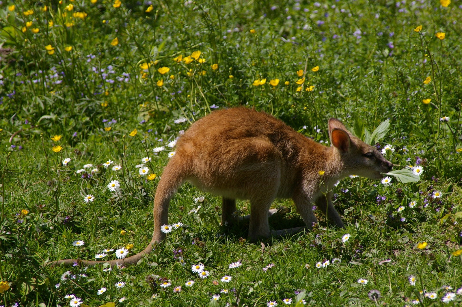 Flinkwallaby im Münchner Zoo